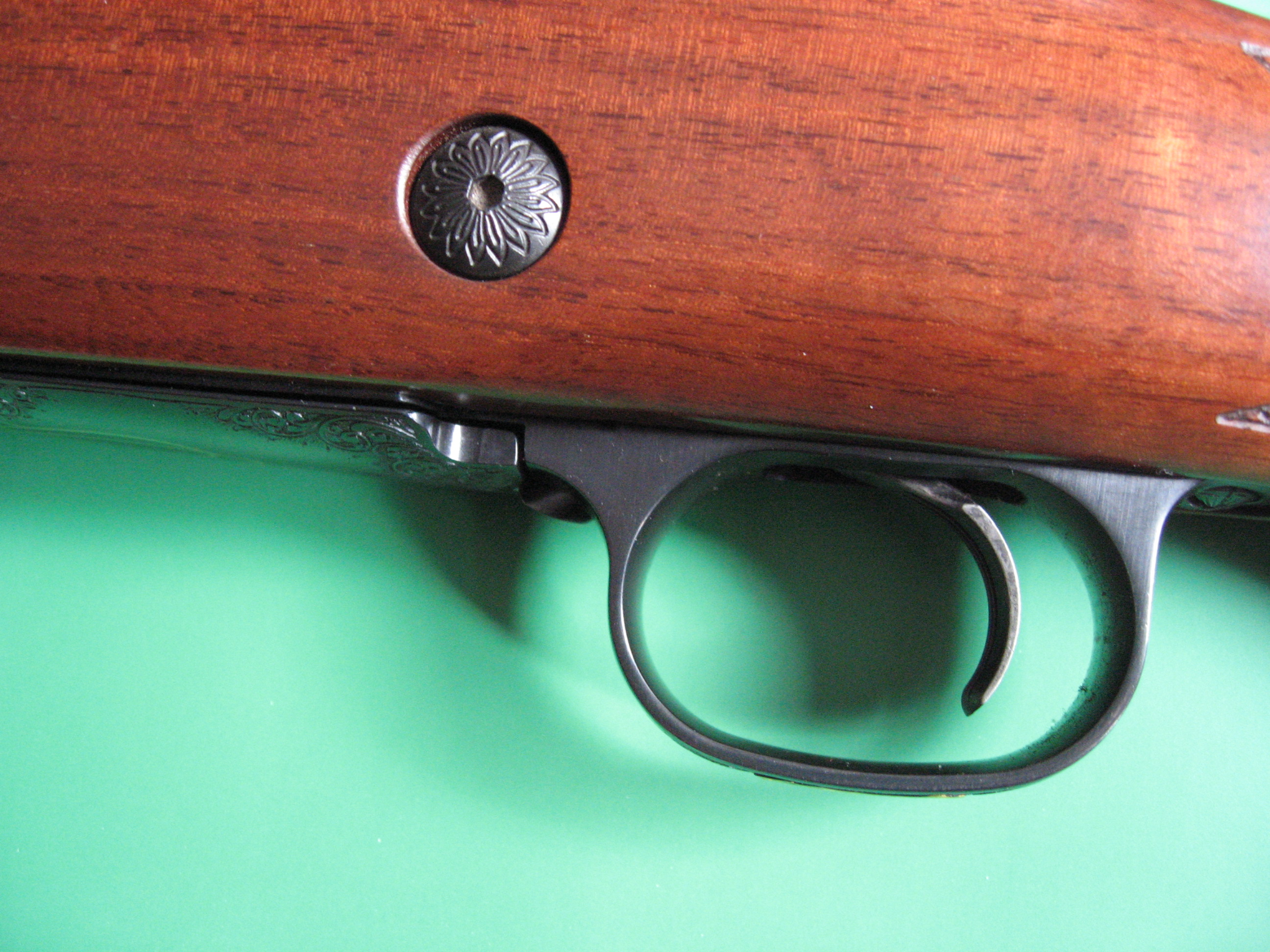 Direktni sprožilec repetirke Winchester M 70.